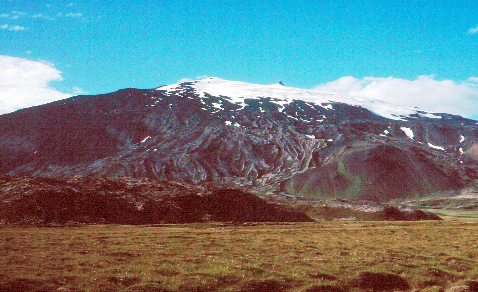 Der Vulkan Snaefellsjökull (Island)